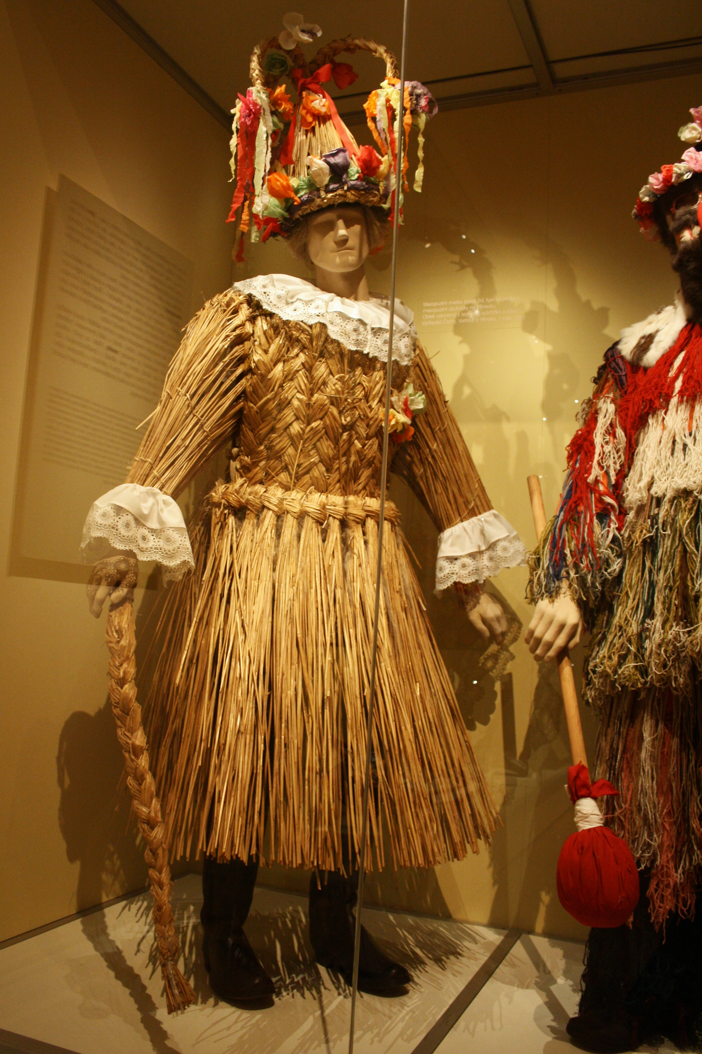 Národopisné muzeum - Musaion: Typická postava masopustní obchůzky na Hlinecku, maska zvaná slaměný. Oblek je vytvořen ze slámy, s textilními doplňky (Východní Čechy, Vortová u Hlinska, 1993)